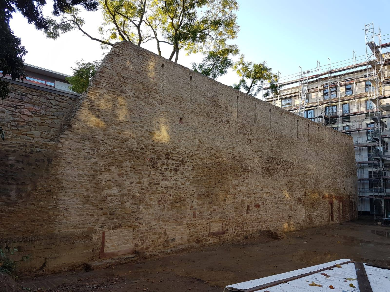 Restaurierte Stadtmauer